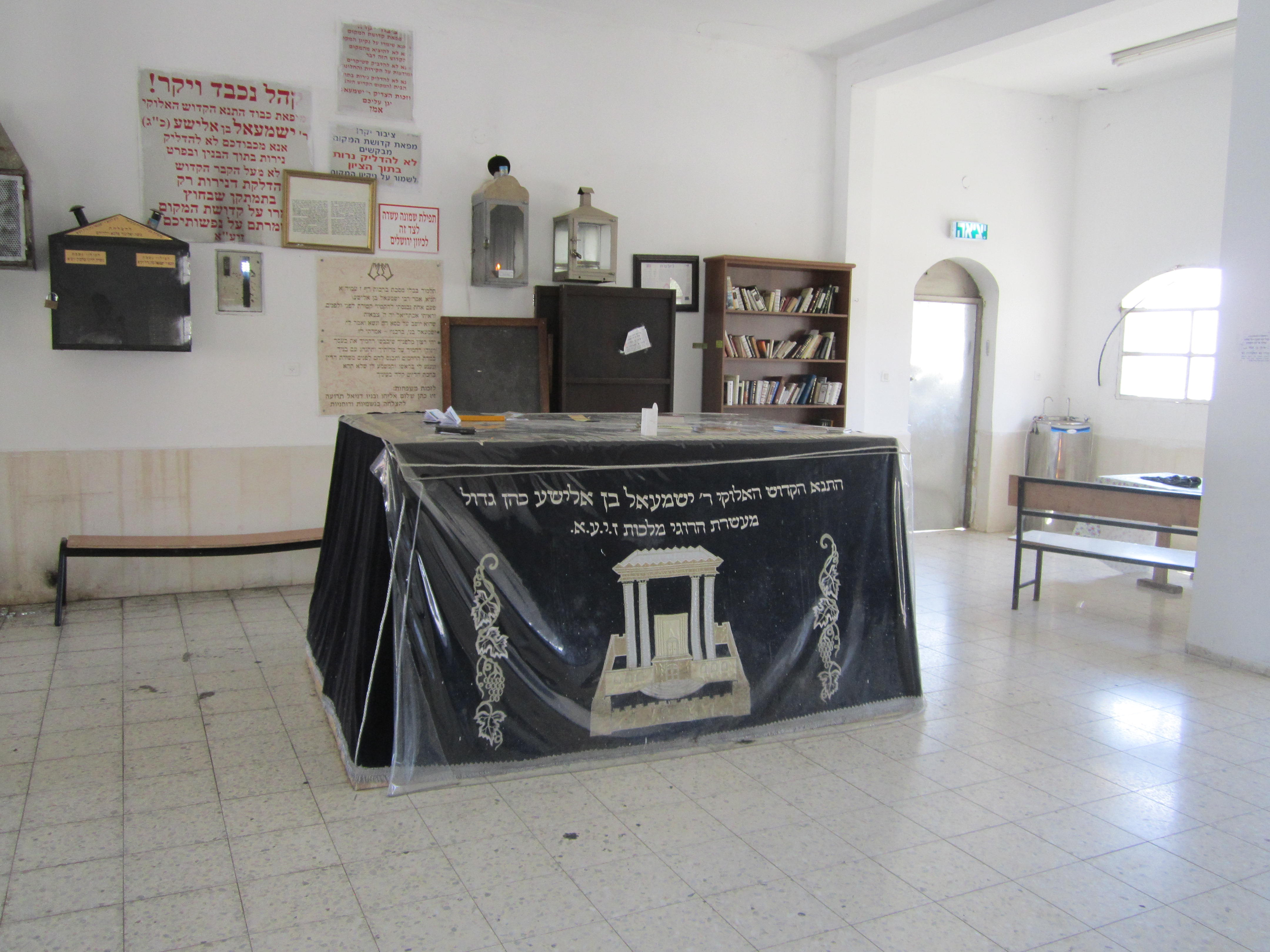 רבי ישמעאל בן אלישע כהן גדול